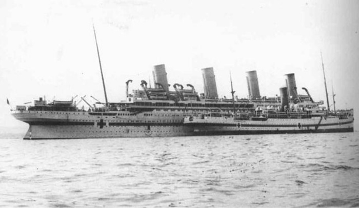 Британик